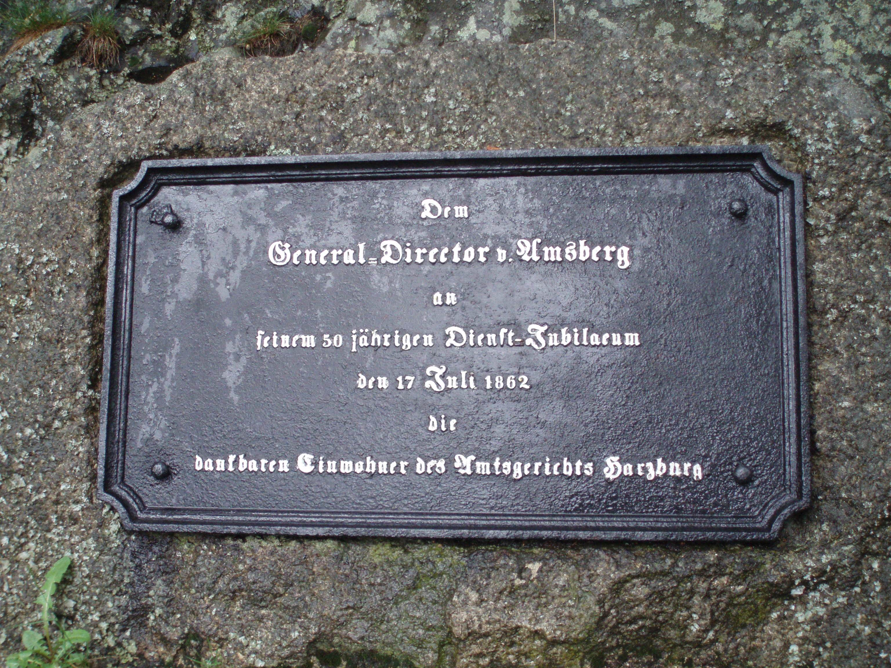 Gedenkplatte für von Amsberg